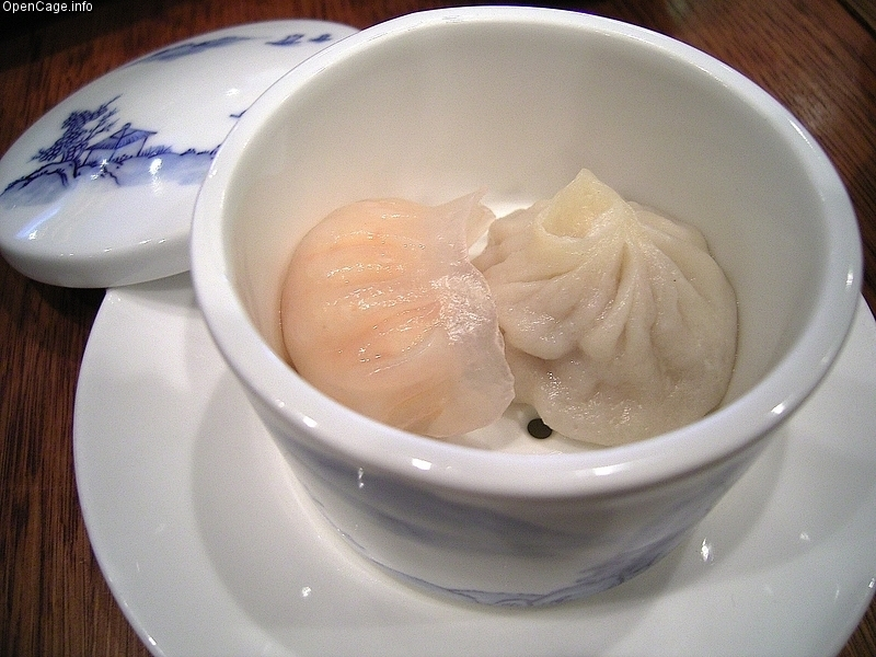 Location: 神戸市東灘区 Higashinada-ku, Kobe